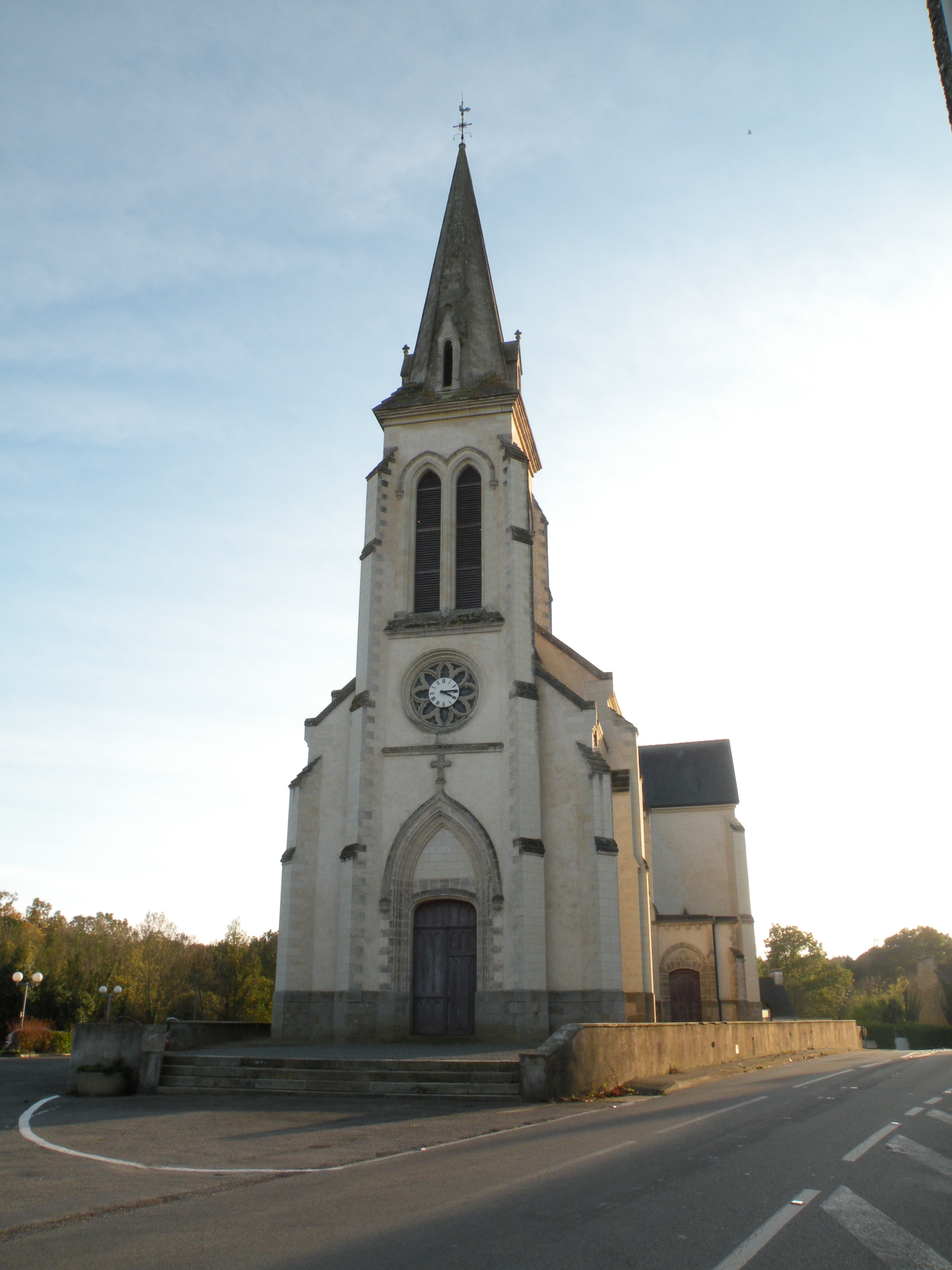 Église de Sévérac.